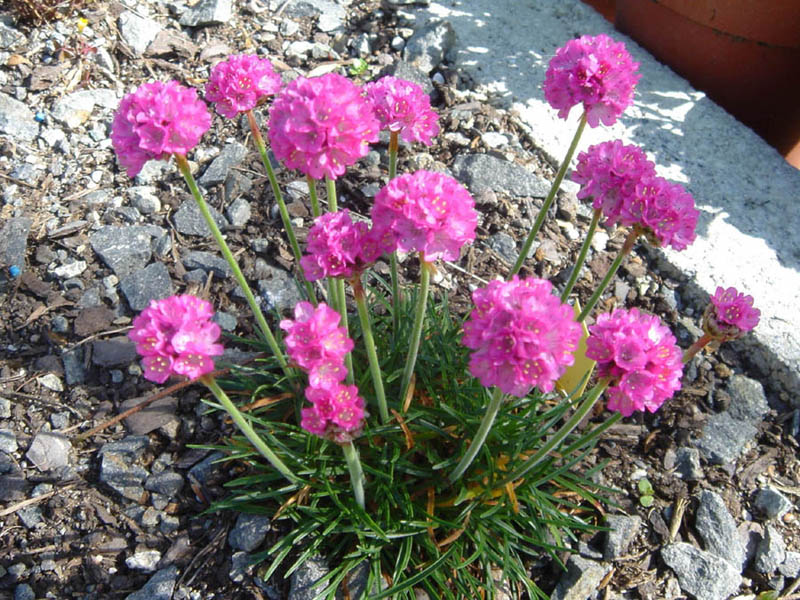 Armeria maritima 'Koster'